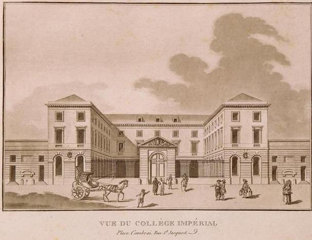 Vue du collège impérial, place Cambrai, rue Saint-Jacques (Collège de France) Versailles, châteaux de Versailles et de Trianon